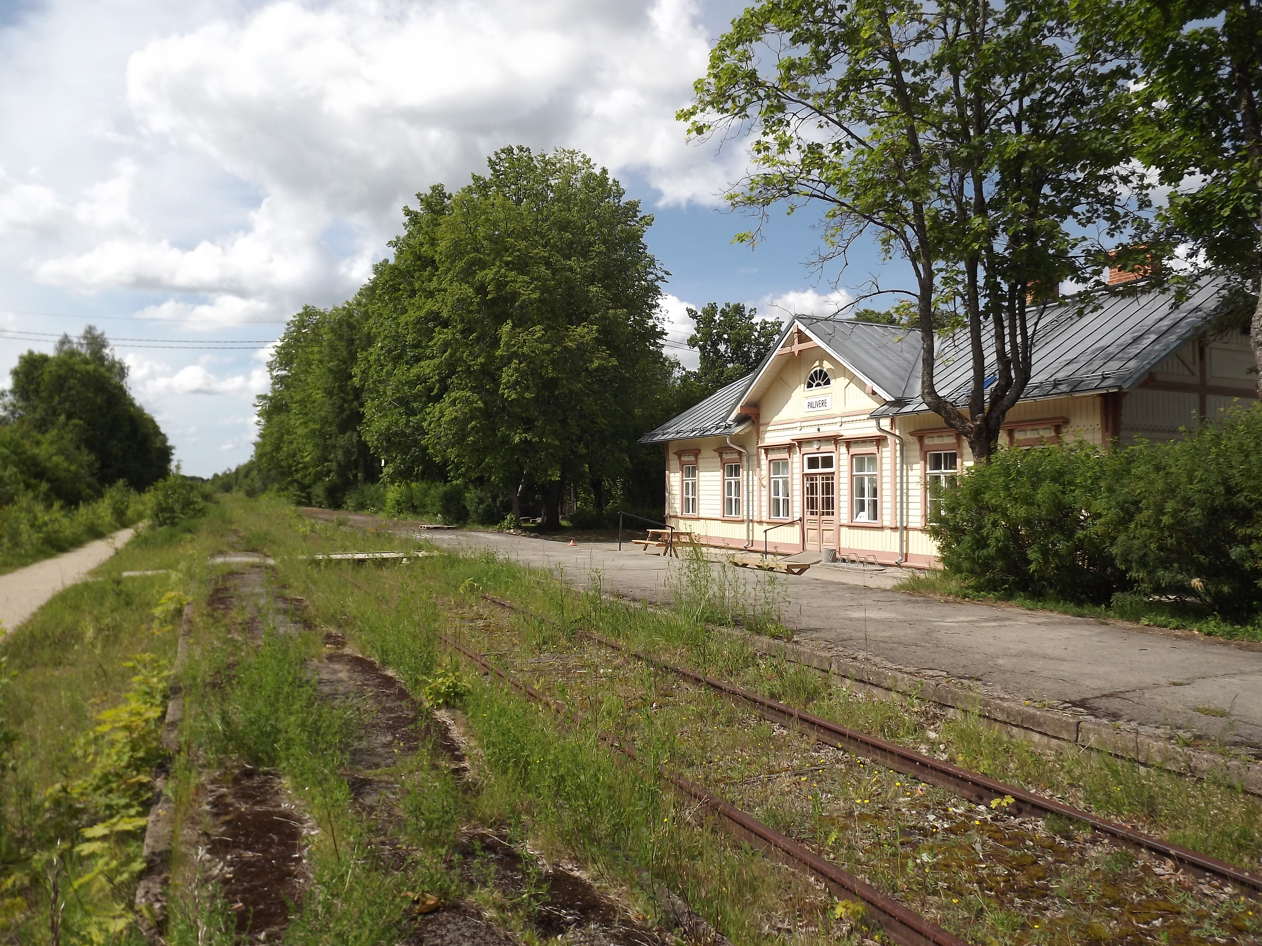 Endine Palivere raudteejaam aastal 2014.